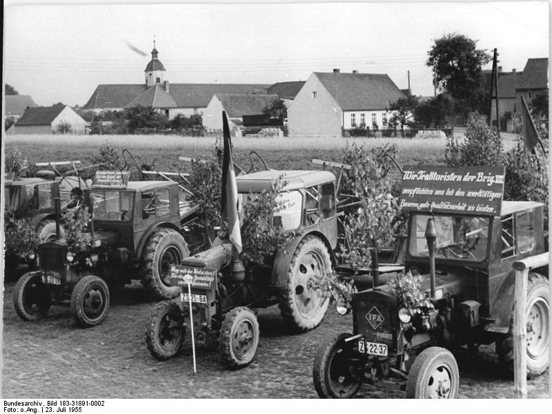 Kosilenzien, Erntebeginn, geschmückte Schlepper Zentralbild Laus. Rundschau 2 Motive 23.7.1955 Ein grosser Tag in der Gemeinde Kosilenzien (Ernte 1955) Der Auftakt zur Friedensernte 1955 war für die Einwohner des Dorfes Kosilenzien ein besonderer Festtag. Mit 27 Traktoren und Mähbindern, mit Funkanlage und Werkstatt, zogen 7 Brigaden der MTS Martinskirchen, Bez. Cottbus, in Kosilenzien ein. Am 21.7.55 begannen die Brigaden der MTS Martinskirchen mit der diesjährigen Friedensernte der Gemeinde Kosilenzien. UBz: Die geschmückten Traktoren und Mähbinder stehen bereit zum Ernteeinsatz.